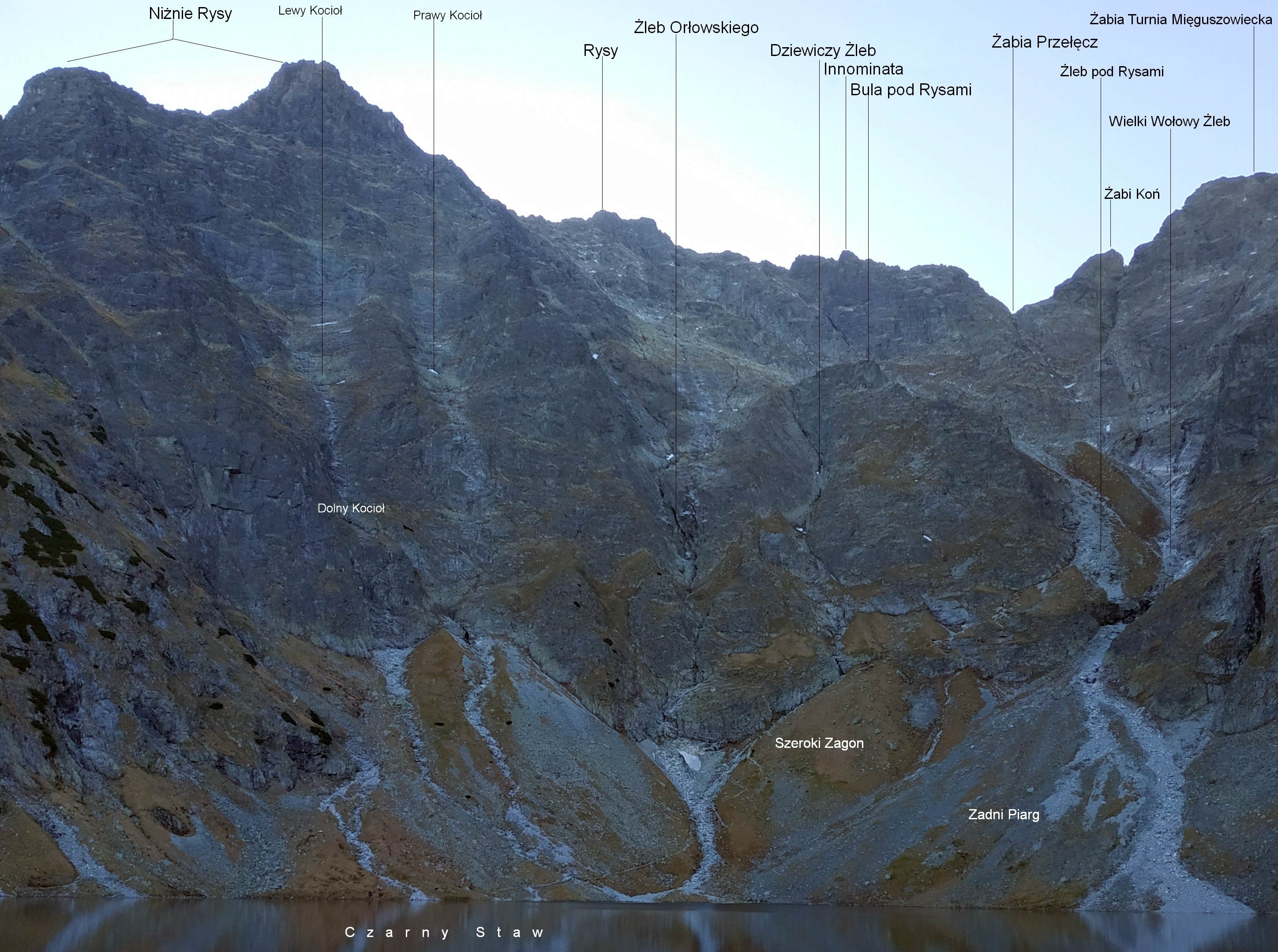 Widok znad Czarnego Stawu pod Rysami